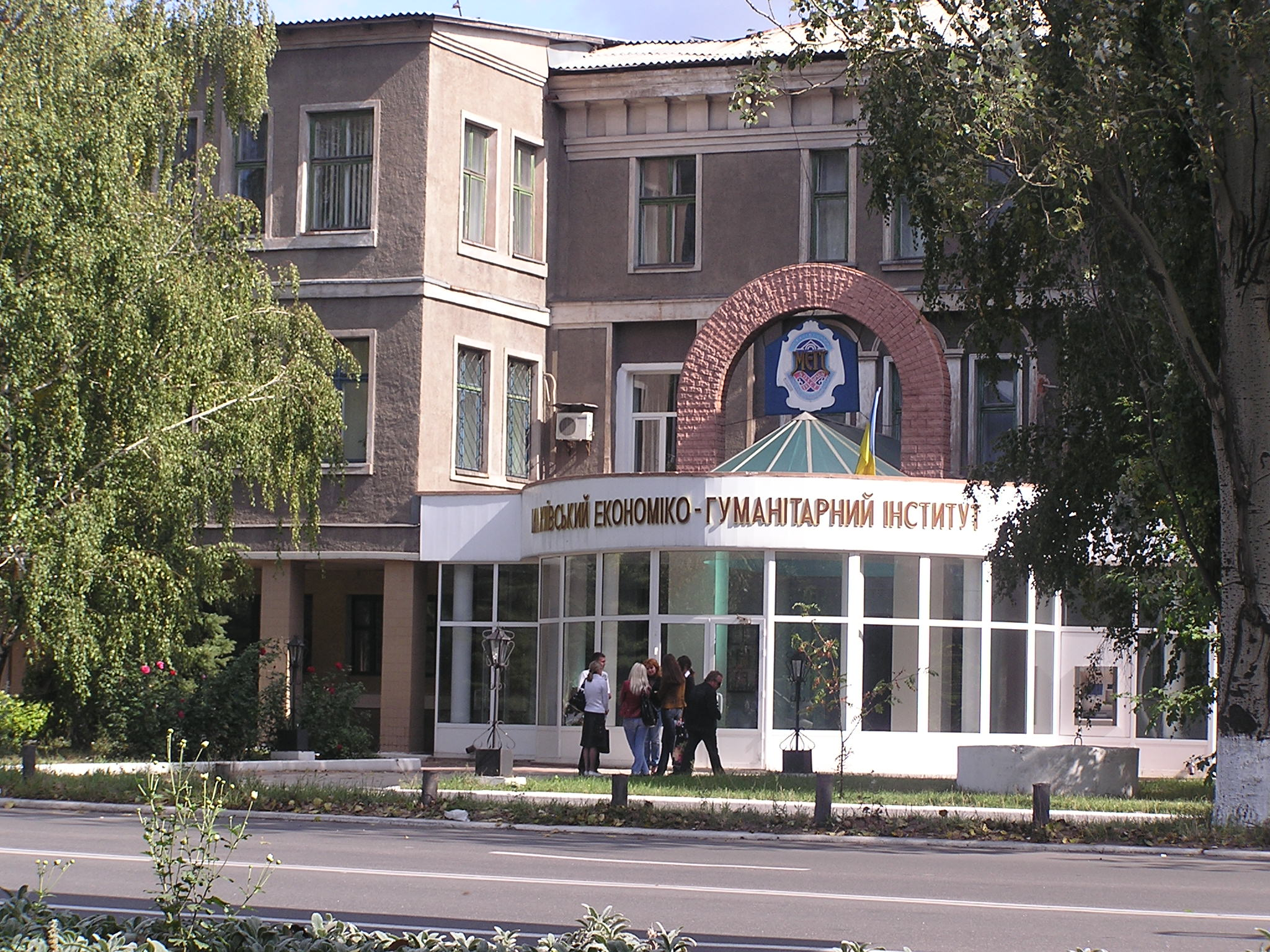 Макеевка